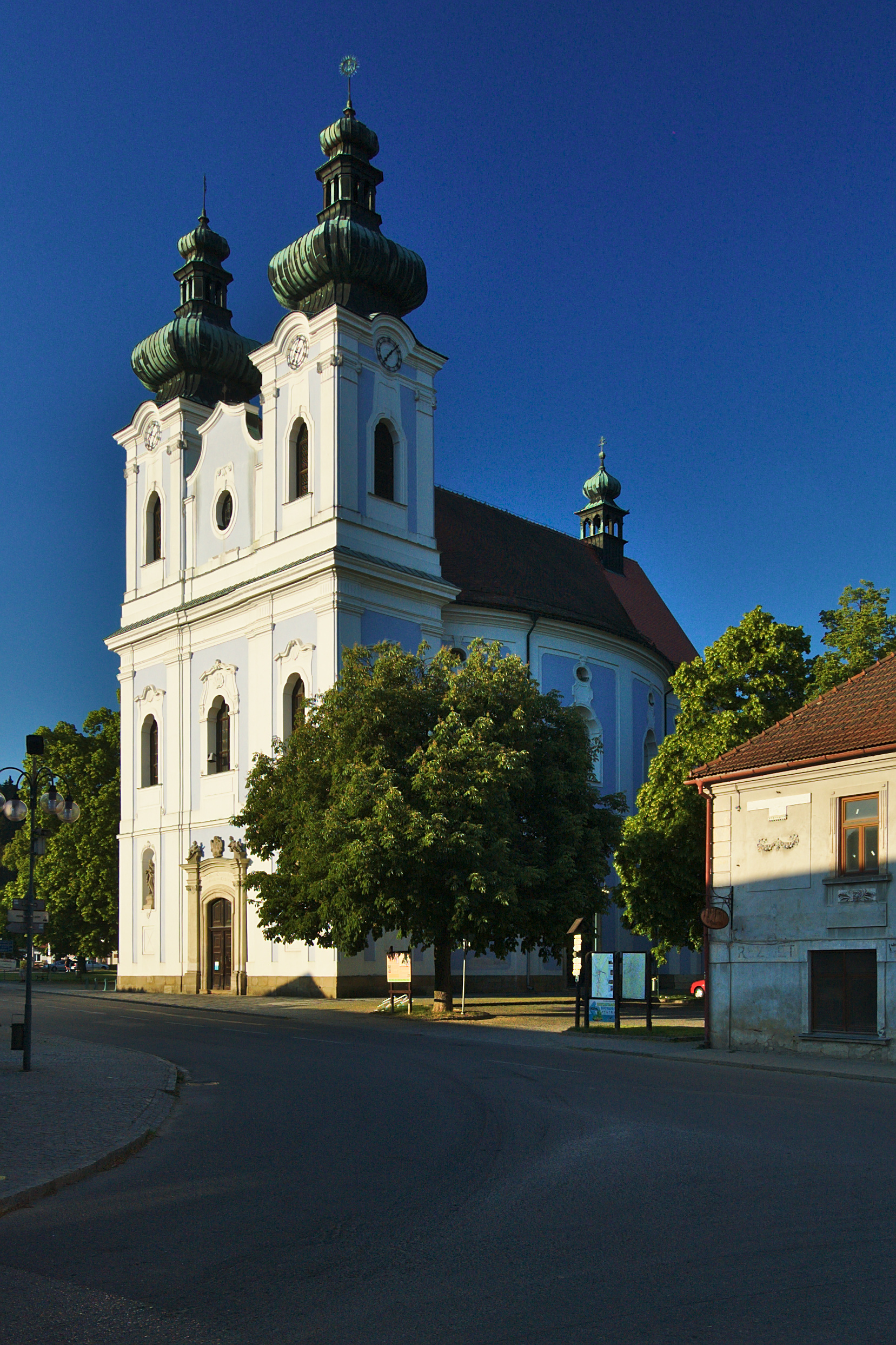 Kostel Panny Marie Bolestné, Sloup, okres Blansko